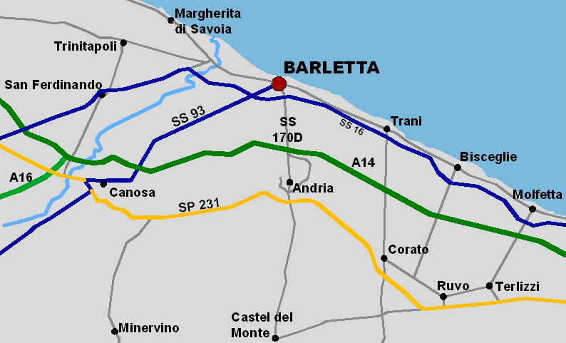 Barletta: planimetria stradale del territorio vicino alla città